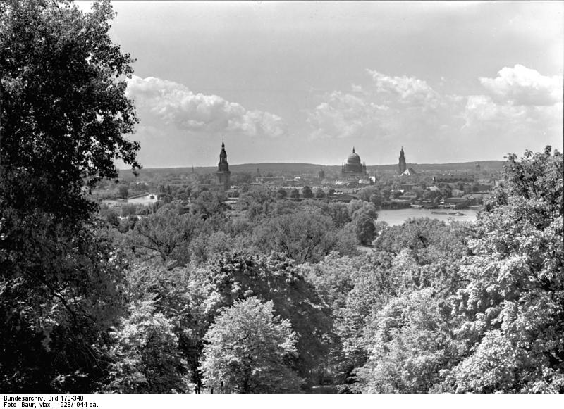 Potsdam.- Blick vom Flatowturm